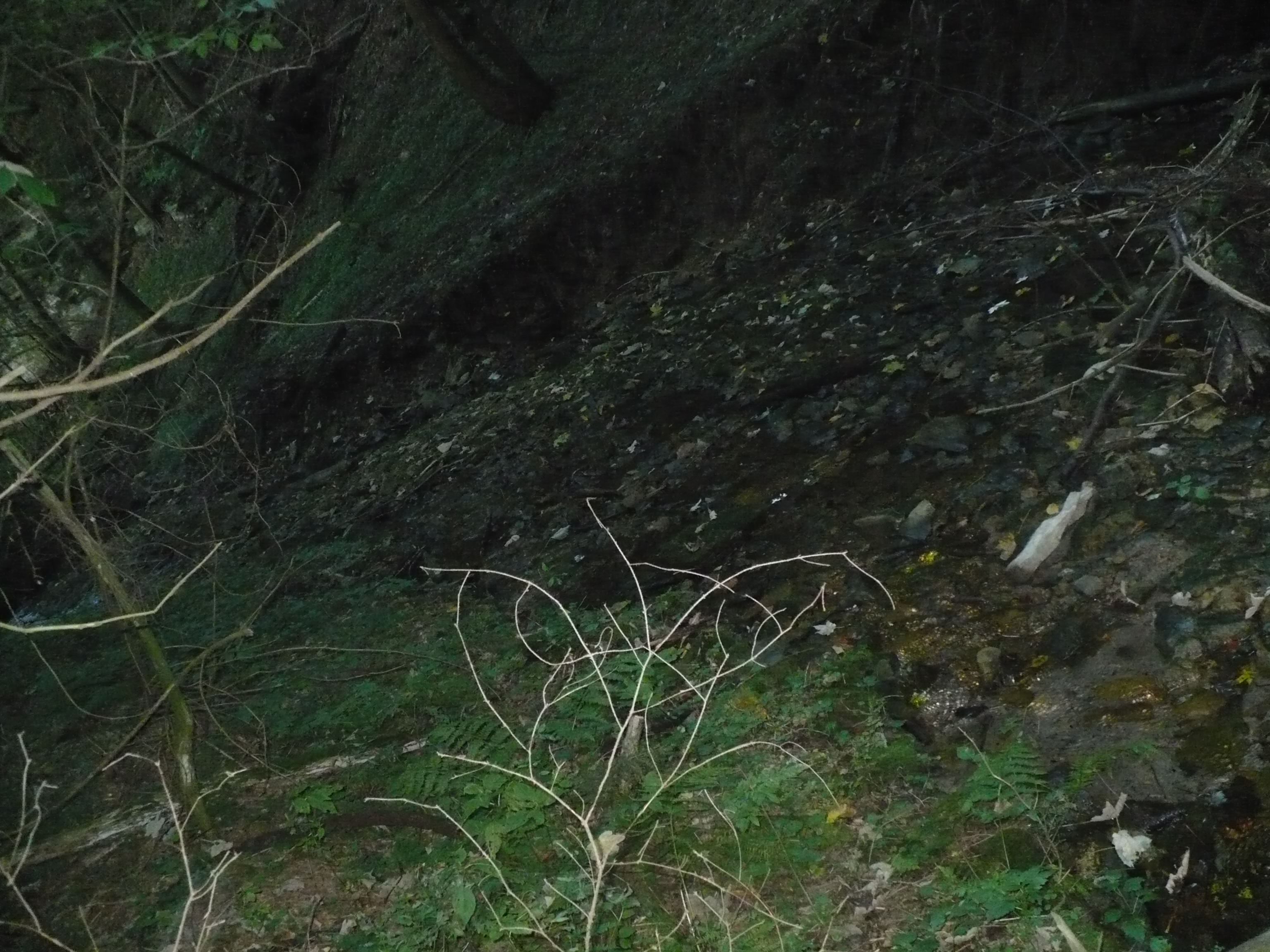 Lukovský potok v lese mezi bývalou osadou Královec a Anenskou Studánkou (šel jsem po "zelené" turistické značce), může to být někde kolem Loc: 49°50'37.598"N, 16°32'2.629"E